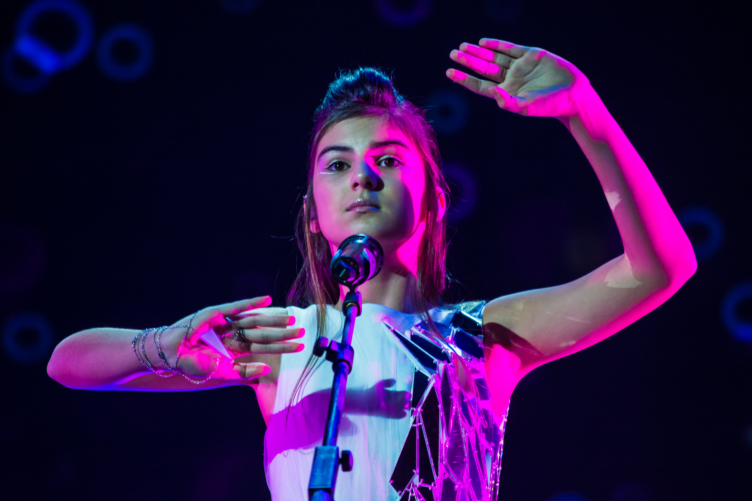 Камилла Исмаилова на сцене Детского Евровидения 2015 («Армеец», София) во время генеральной репетиции